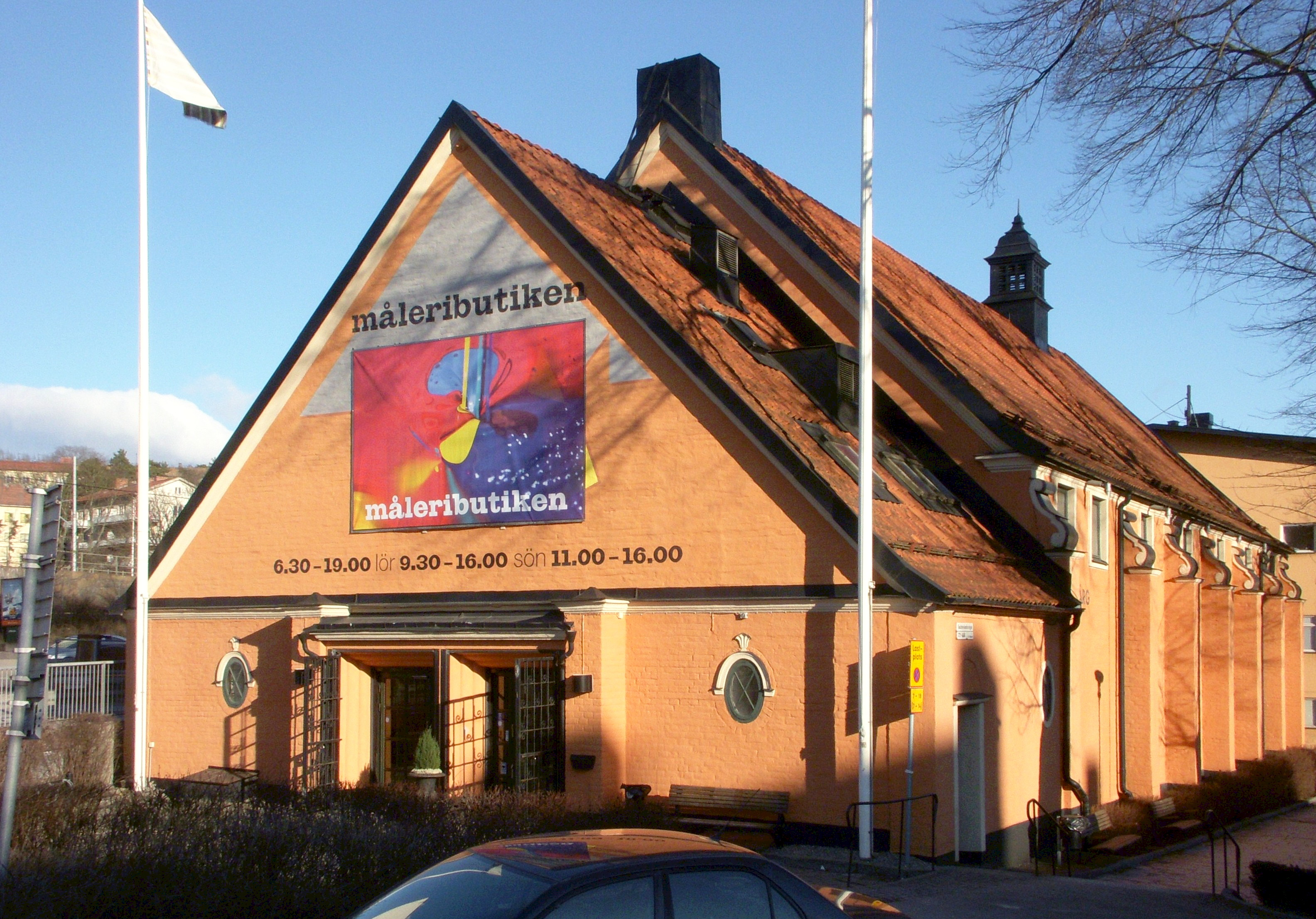 Före detta Bromma-Teatern vid Alvik i Bromma, arkitekt Gustaf E. Petterson (1855-1933). Bromma-Teatern byggdes 1921-1922. Första föreställningen gavs den 27 september 1921. Biografen stängde 1971. Numera finns Måleributiken i Alvik AB i byggnaden på Drottningholmsvägen 175.